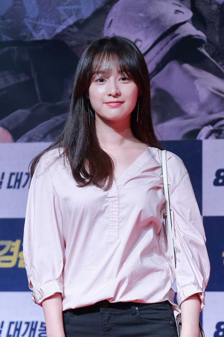 170807 청년경찰 VIP 시사회